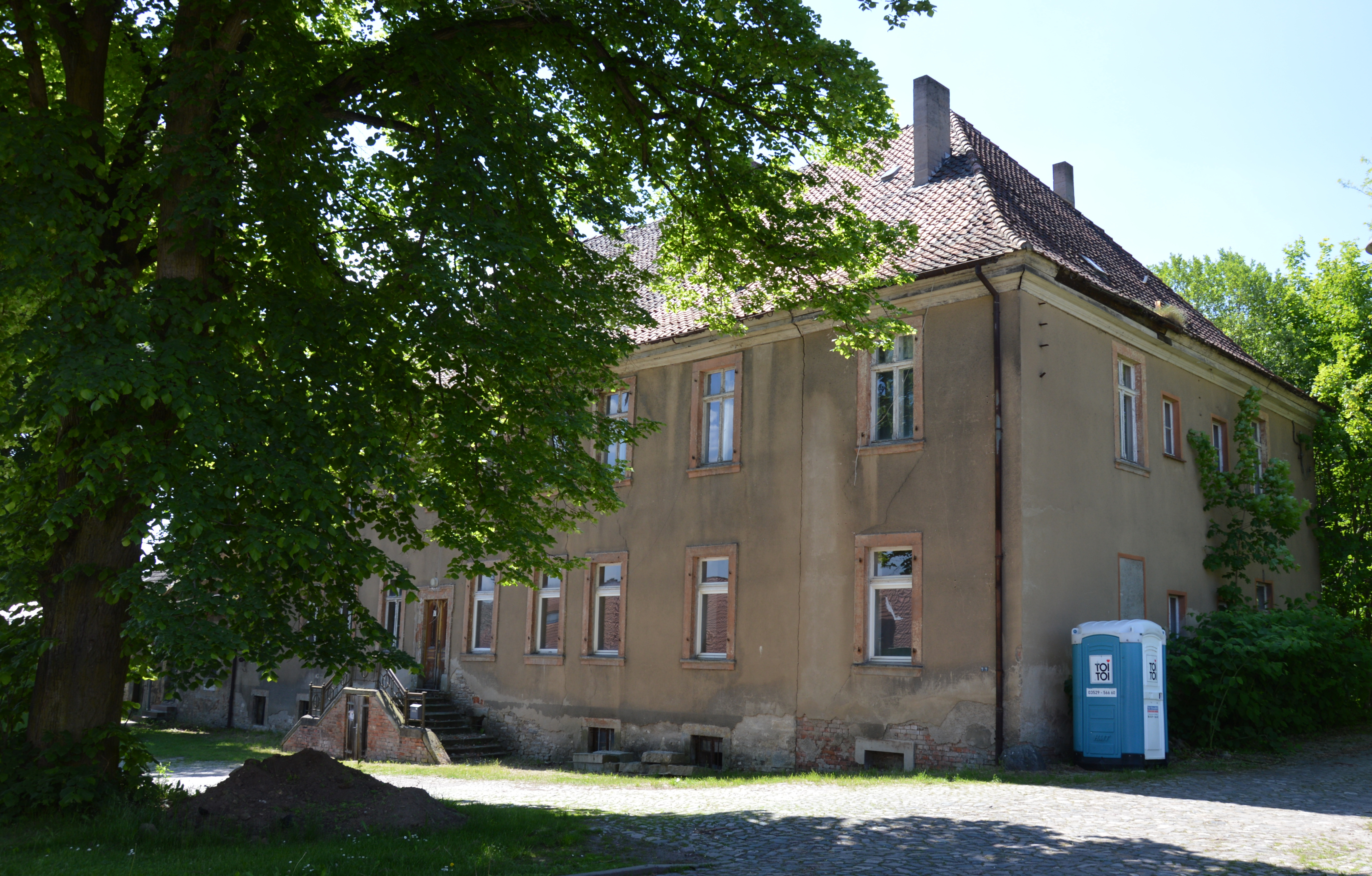 Auf dem Amt in Hötensleben